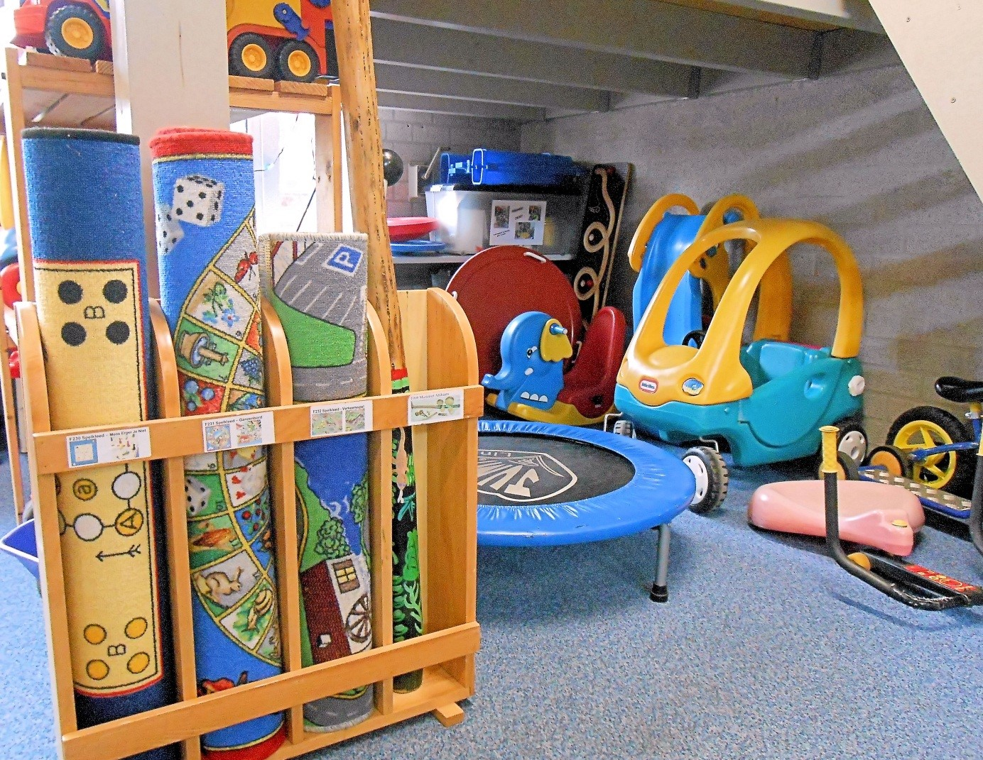 Foto's hoe een speelotheek eruit ziet